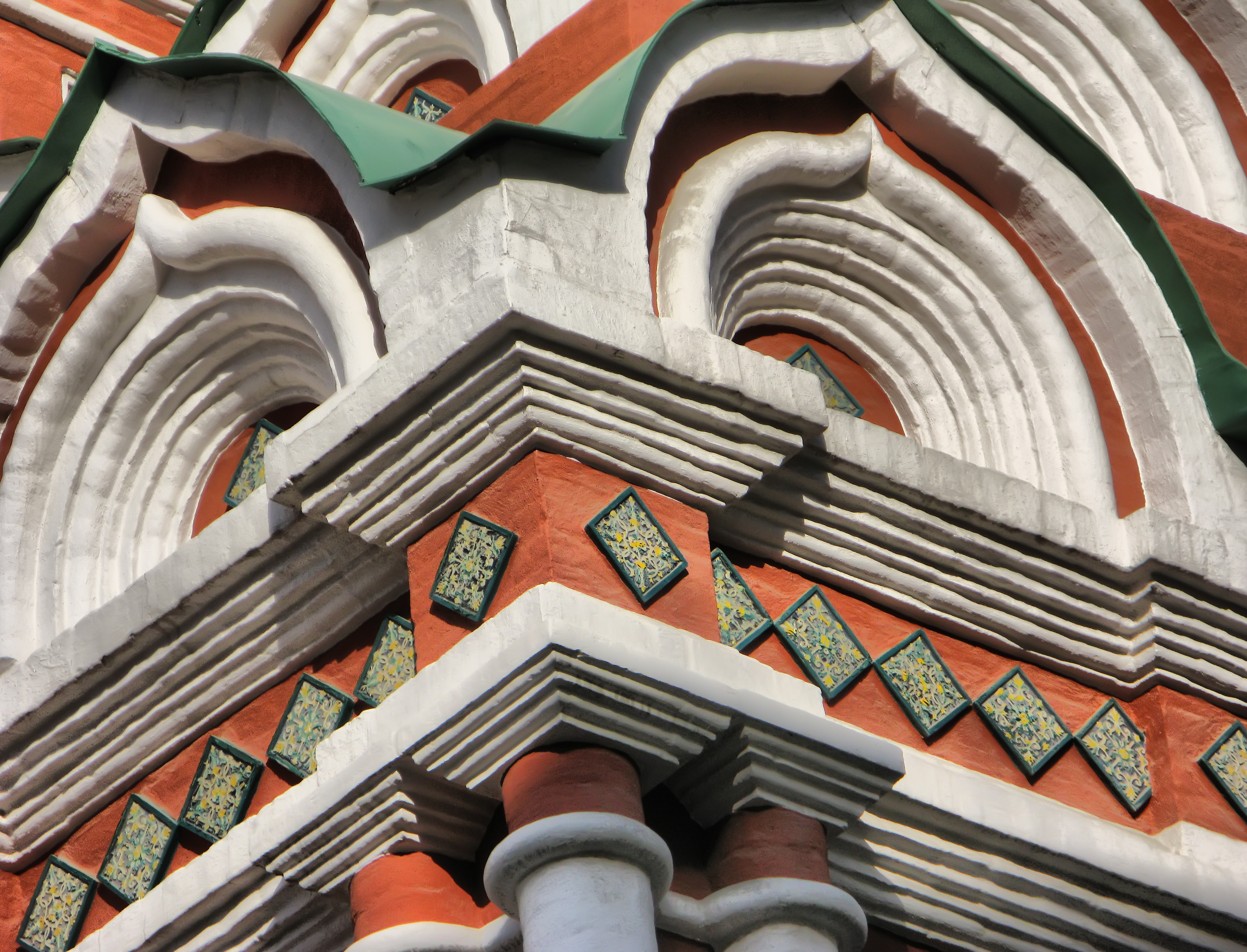 Китай-город